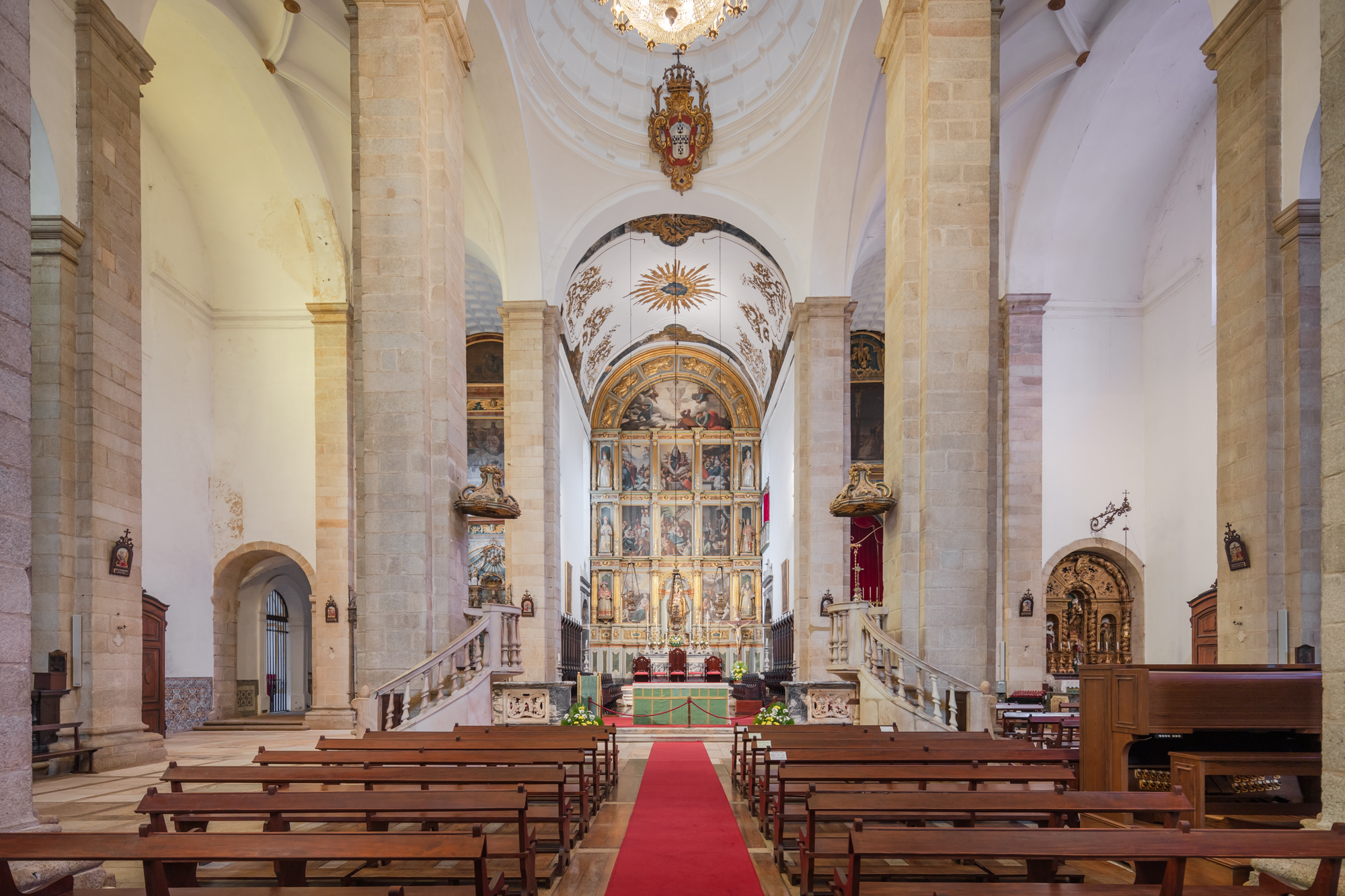 O retábulo da Capela-mor é o conjunto com maior importância artística.